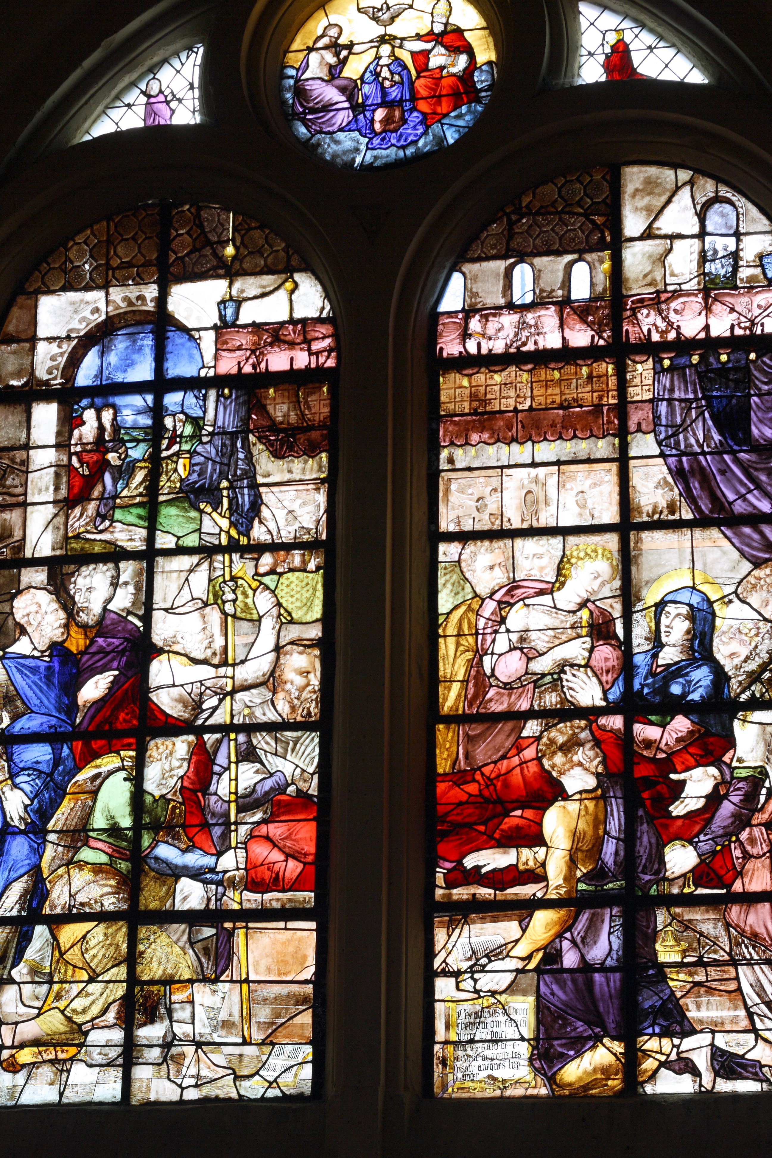 Katholische Pfarrkirche Saint-Martin in Triel-sur-Seine im Département Yvelines (Île-de-France/Frankreich), Bleiglasfenster (n° 10) aus dem 16. Jahrhundert, Darstellung: Tod Mariens